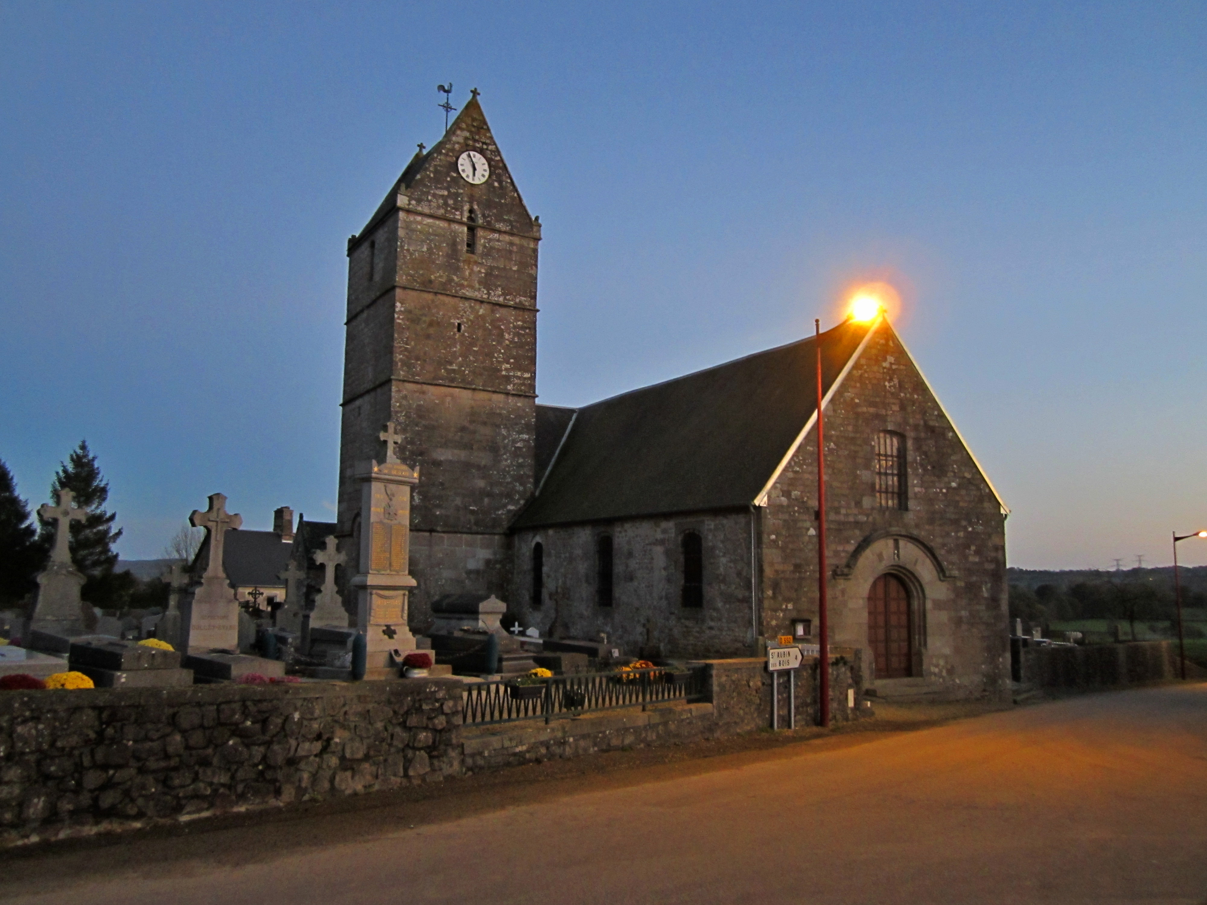 Beslon, Manche